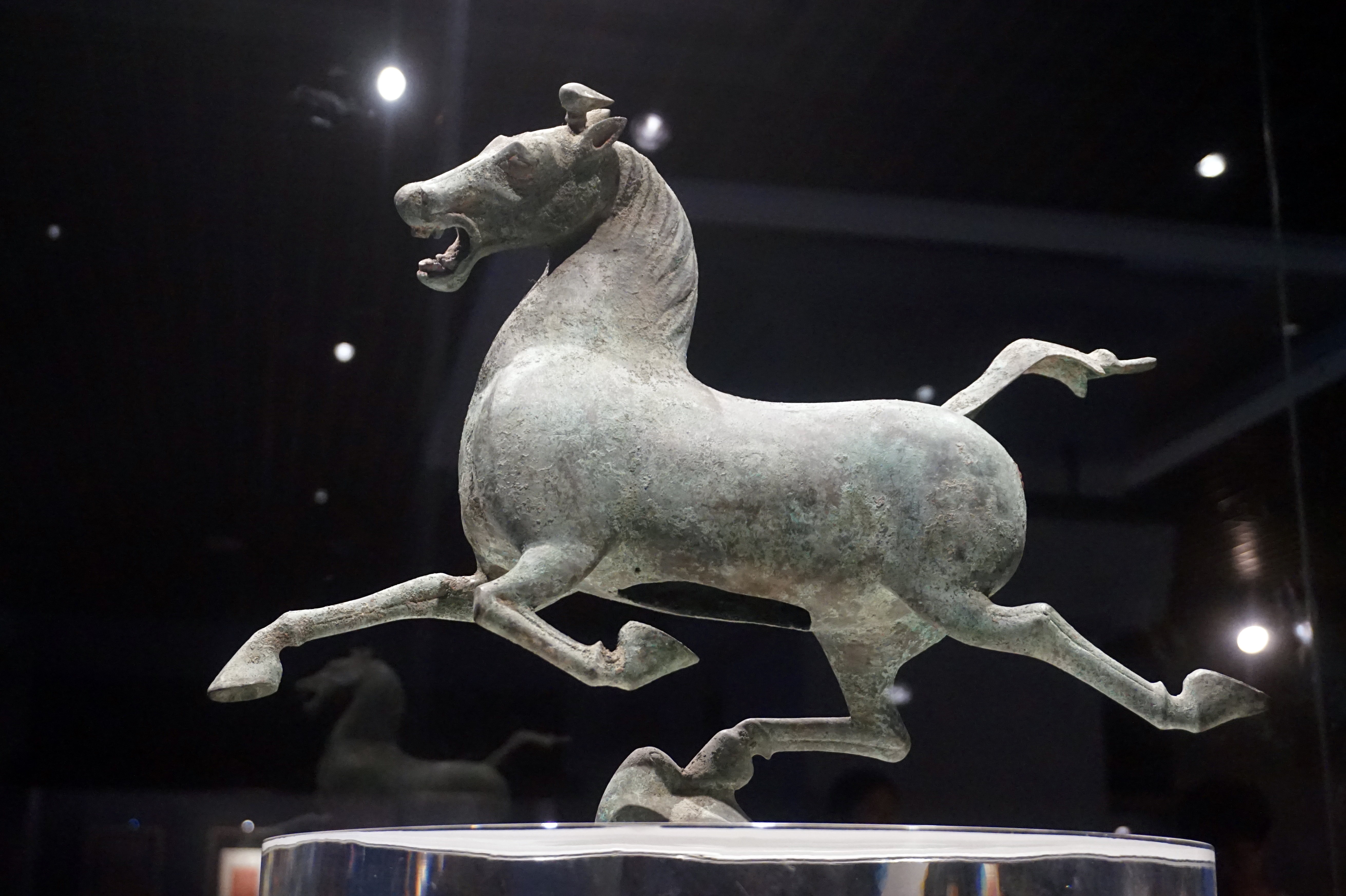 铜奔马（“马踏飞燕”），雷台汉墓出土。甘肃省博物馆藏。